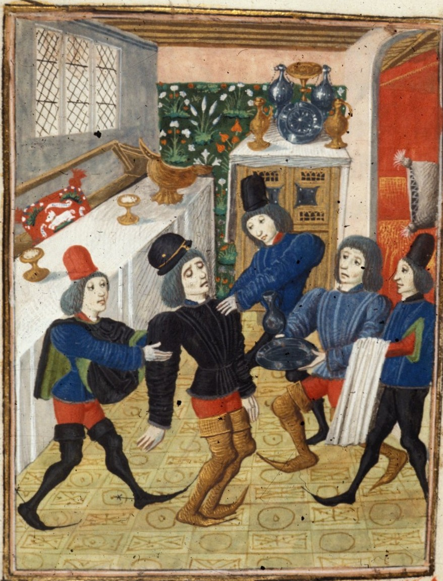 La mort de Gaston Fébus.